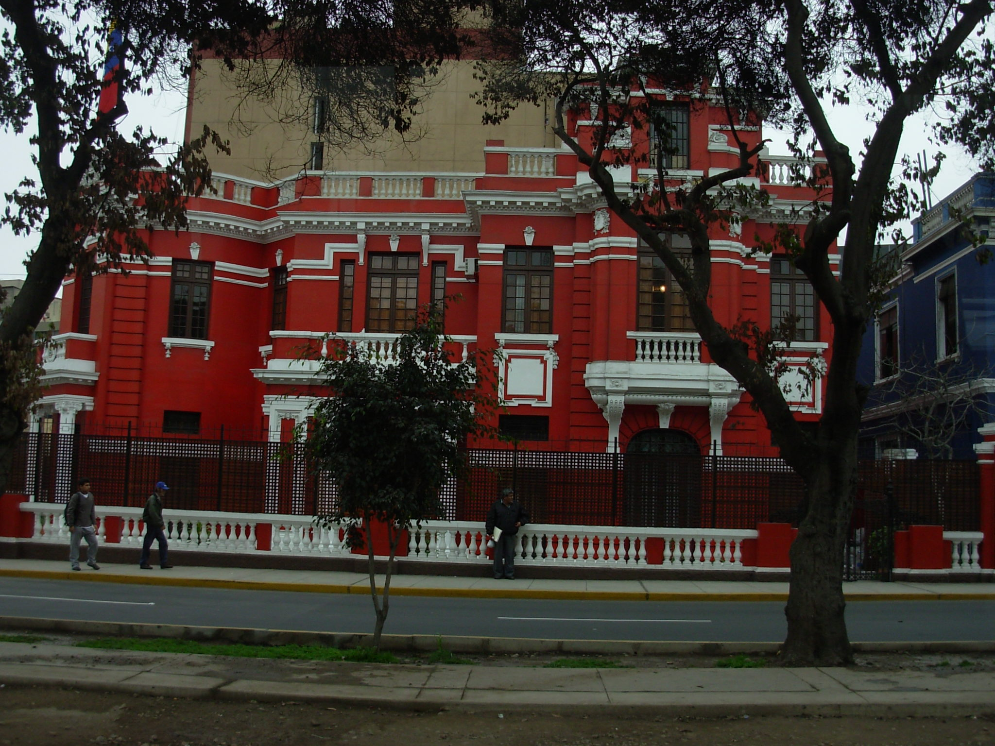 Embajada de Venezuela en Lima, Peru